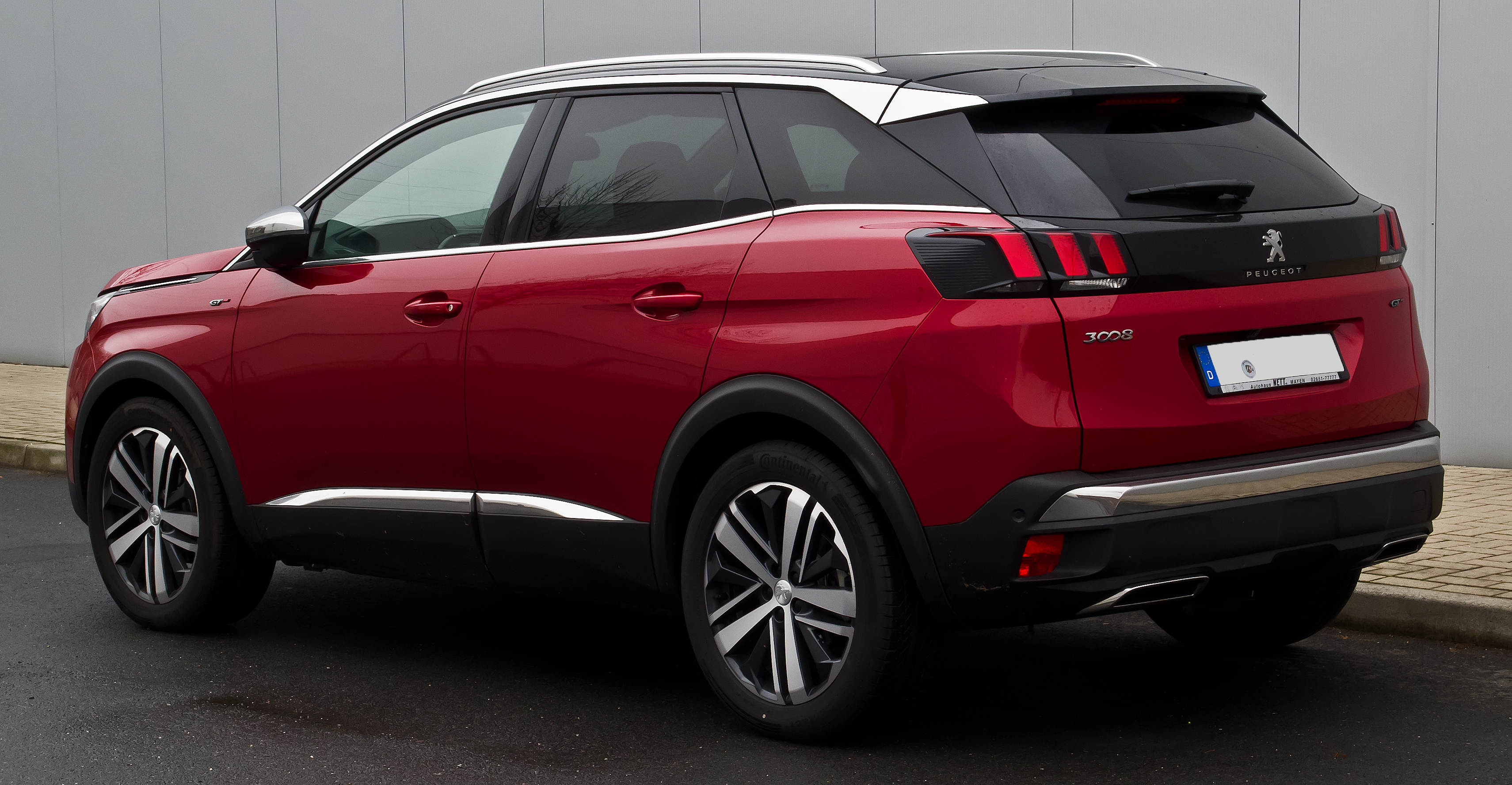 Peugeot 3008 BlueHDi 180 EAT8 GT (II)